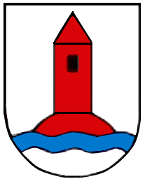 Wappen von Lippach in Westhausen (Württemberg), Germany, Baden-Württemberg